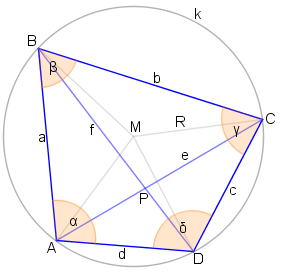 Sehnenviereck bei dem die Seiten e und f beschriftet sind